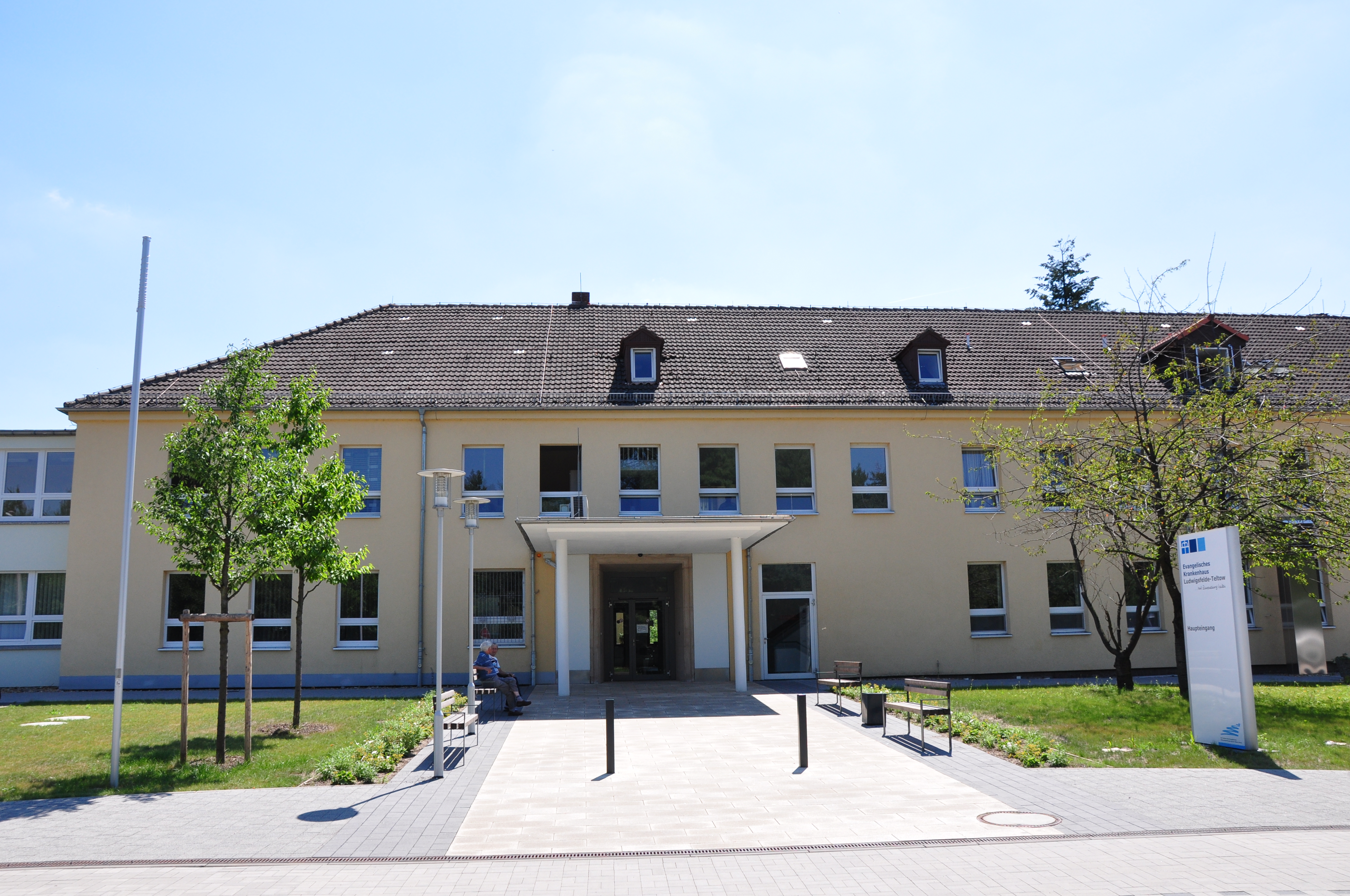 Haupteingang des Evangelischen Krankenhauses Ludwigsfelde-Teltow